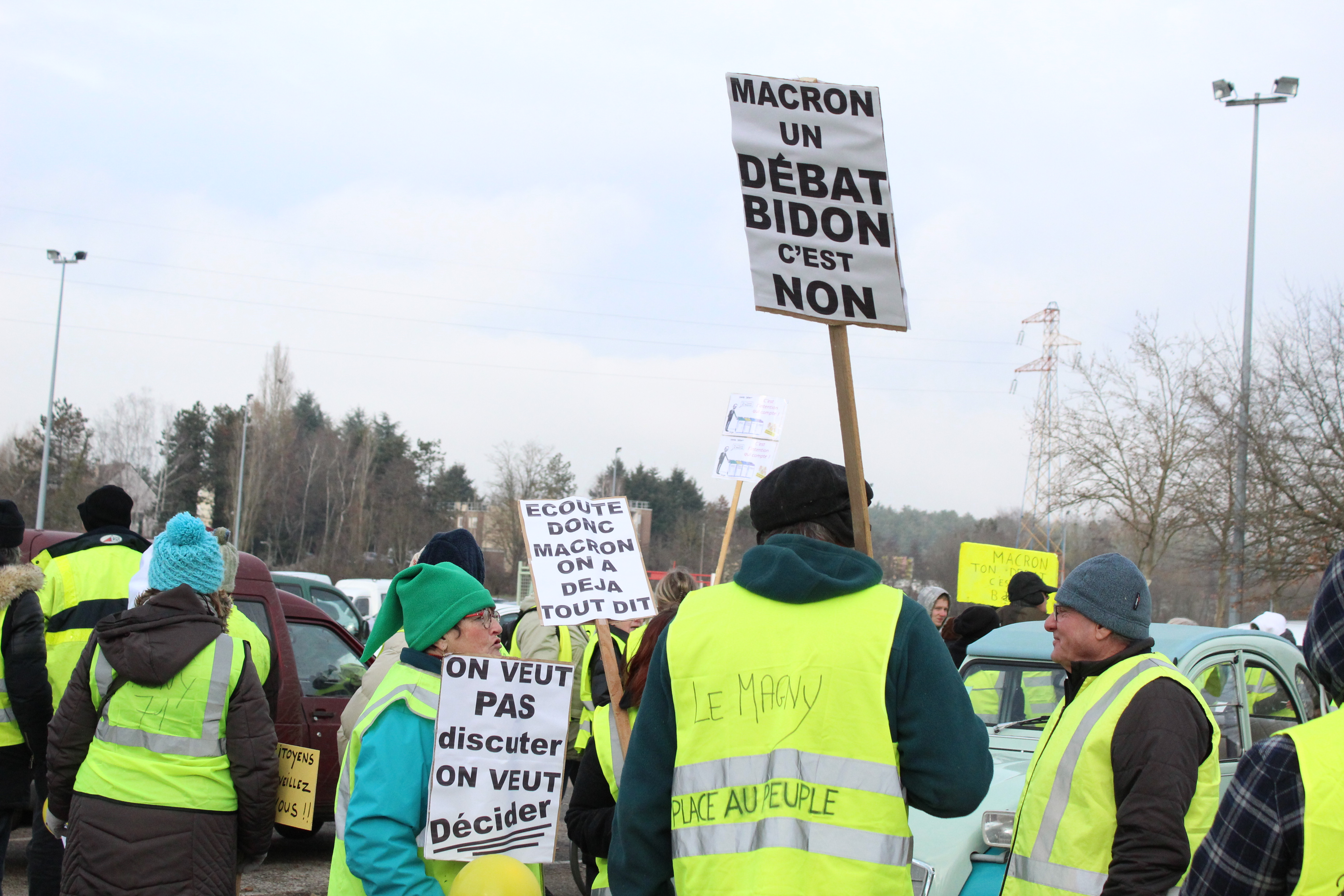 Rassemblement à l'Embarcadère avant une marche des Gilets jaunes du Magny, à Montceau-les-Mines (Saône-et-Loire, France). Les manifestants ont écrits sur leurs pancartes : "Macron, un débat bidon c'est non", "On veut pas discuter on décider", "Écoute donc Macron on a déjà tout dit". Sur le gilet jaune de l'homme au béret : "Le Magny, place au peuple".